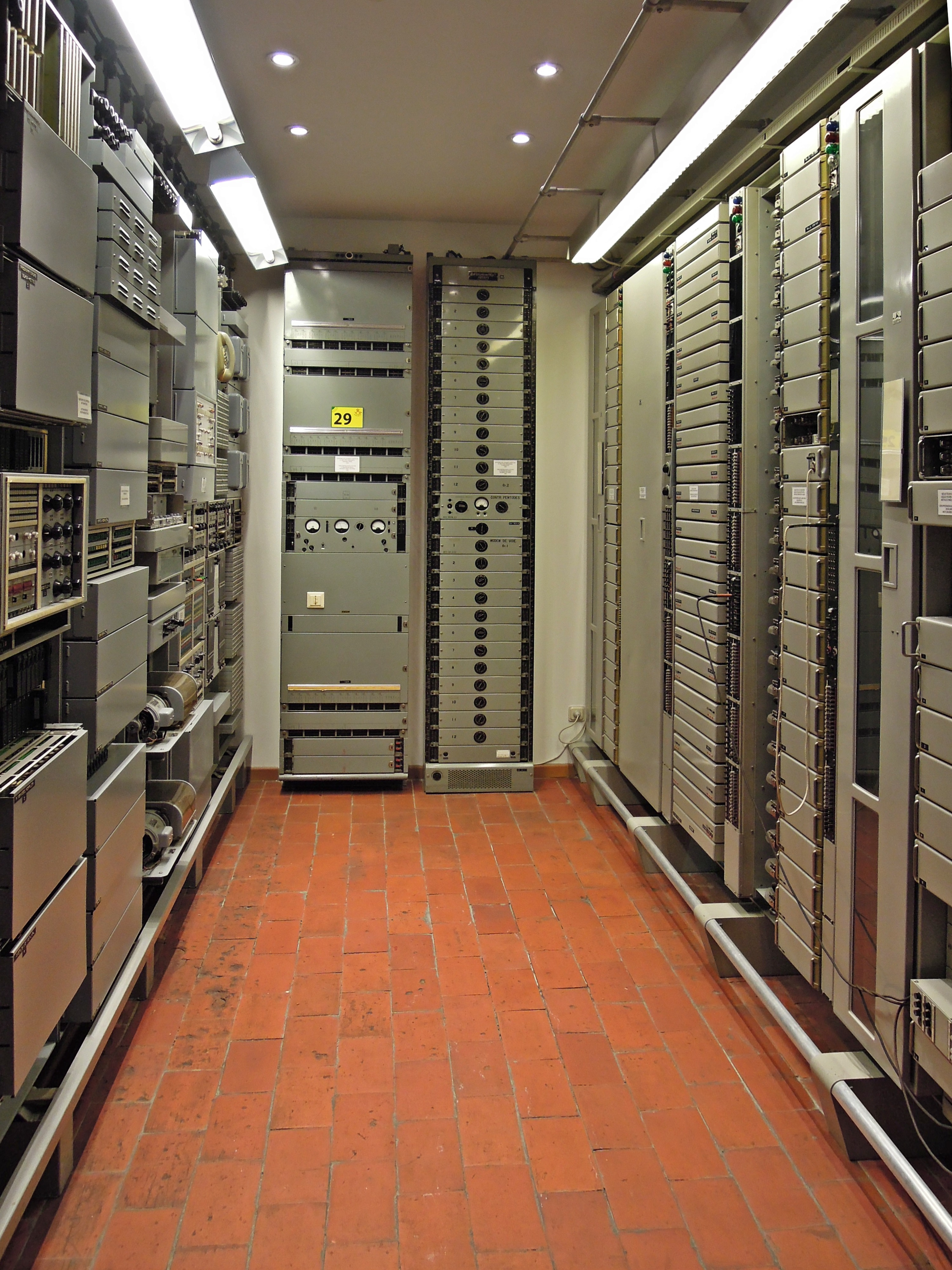 Telefonvermittlung